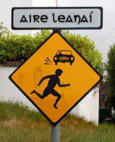 "Peligro Niños".